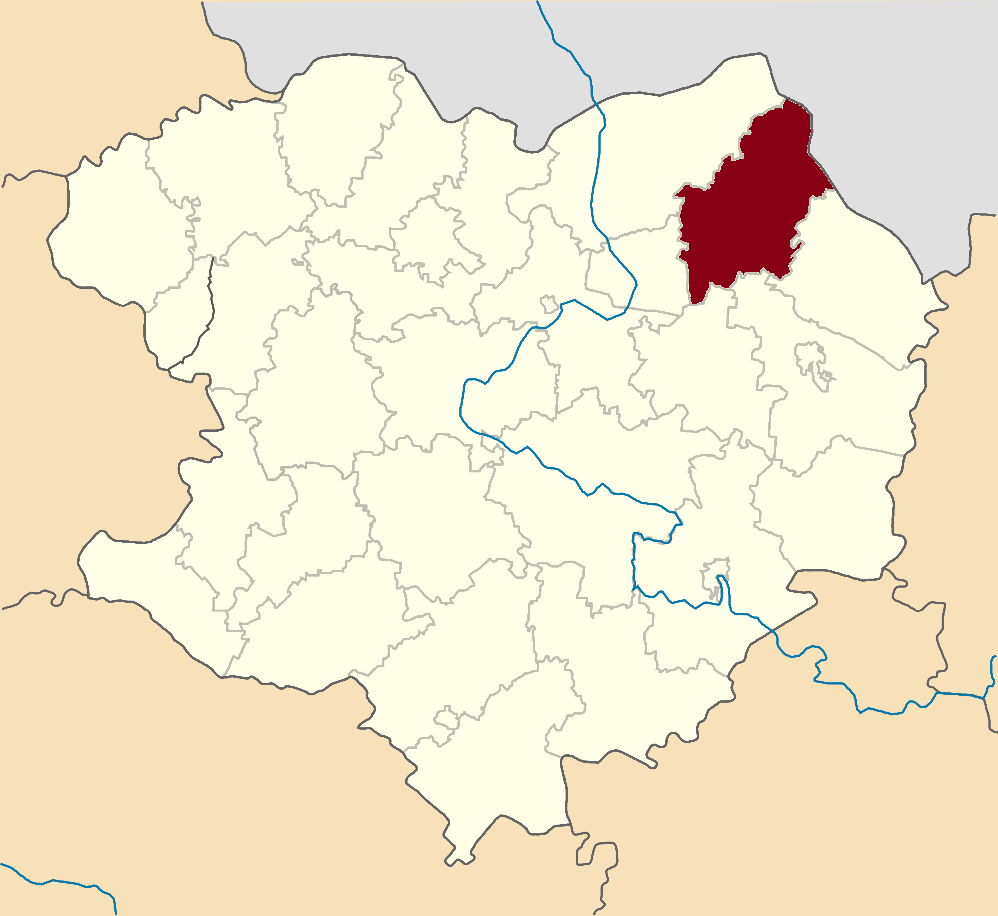 Velykoburlutskyi-Raion map